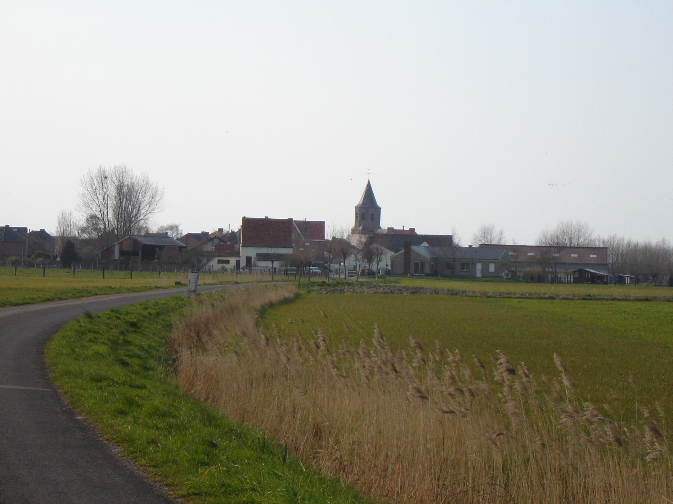 Uitzicht op NieuwmunsterView on the village of Nieuwmunster, in Zuienkerke, West Flanders, Belgium